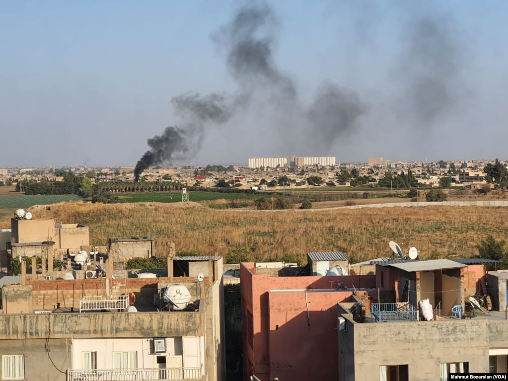 Barış Pınarı Harekâtı sonrası Kamışlı'dan yükselen dumanların Nusaybin'den görüntüsü